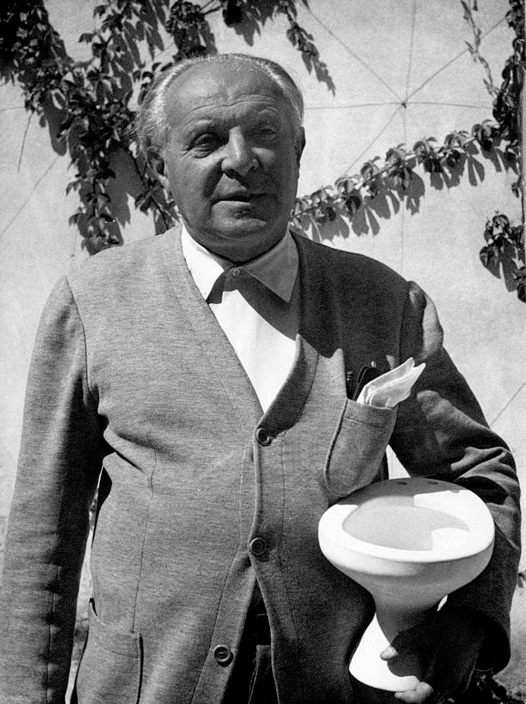 Gio Ponti